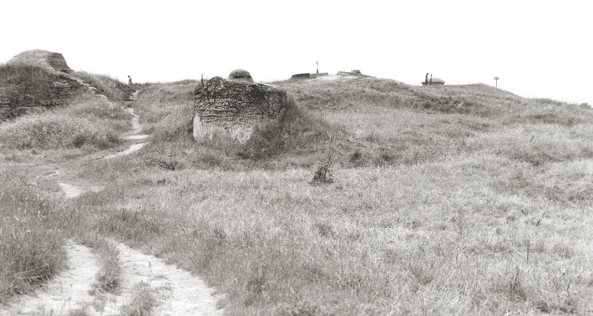 Festung Douamont